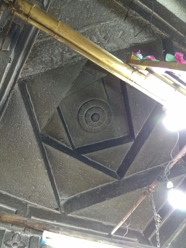 कलाकृती